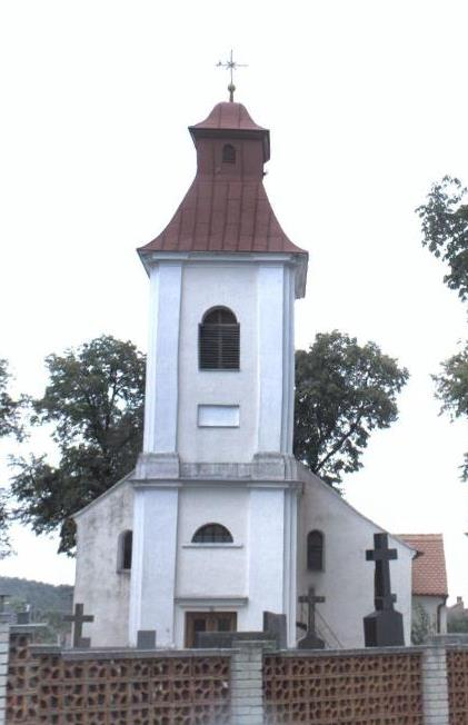 kostel sv. Kunhuty ve Vedrovicích